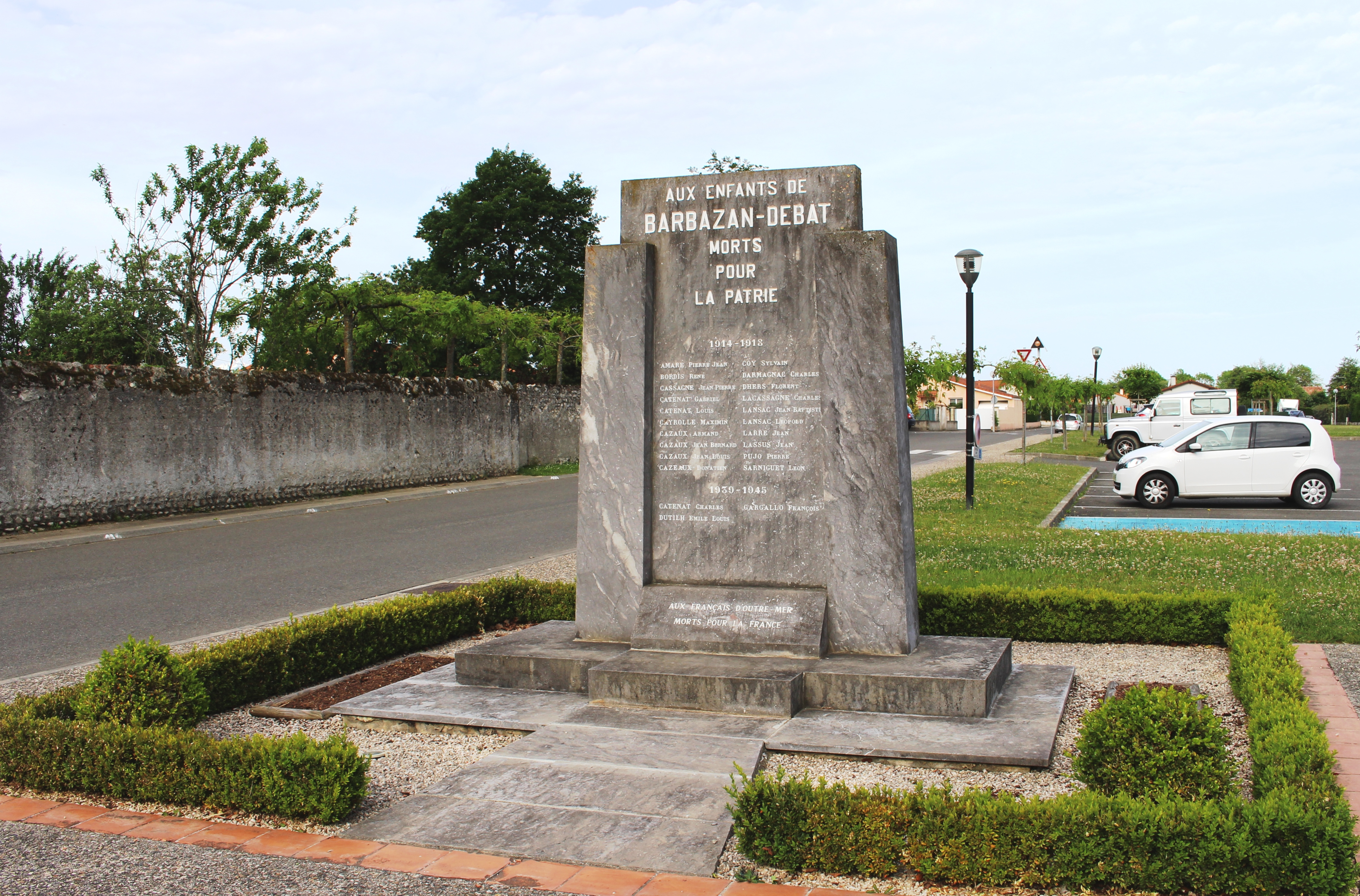 Monument aux morts de Barbazan-Debat (Hautes-Pyrénées)